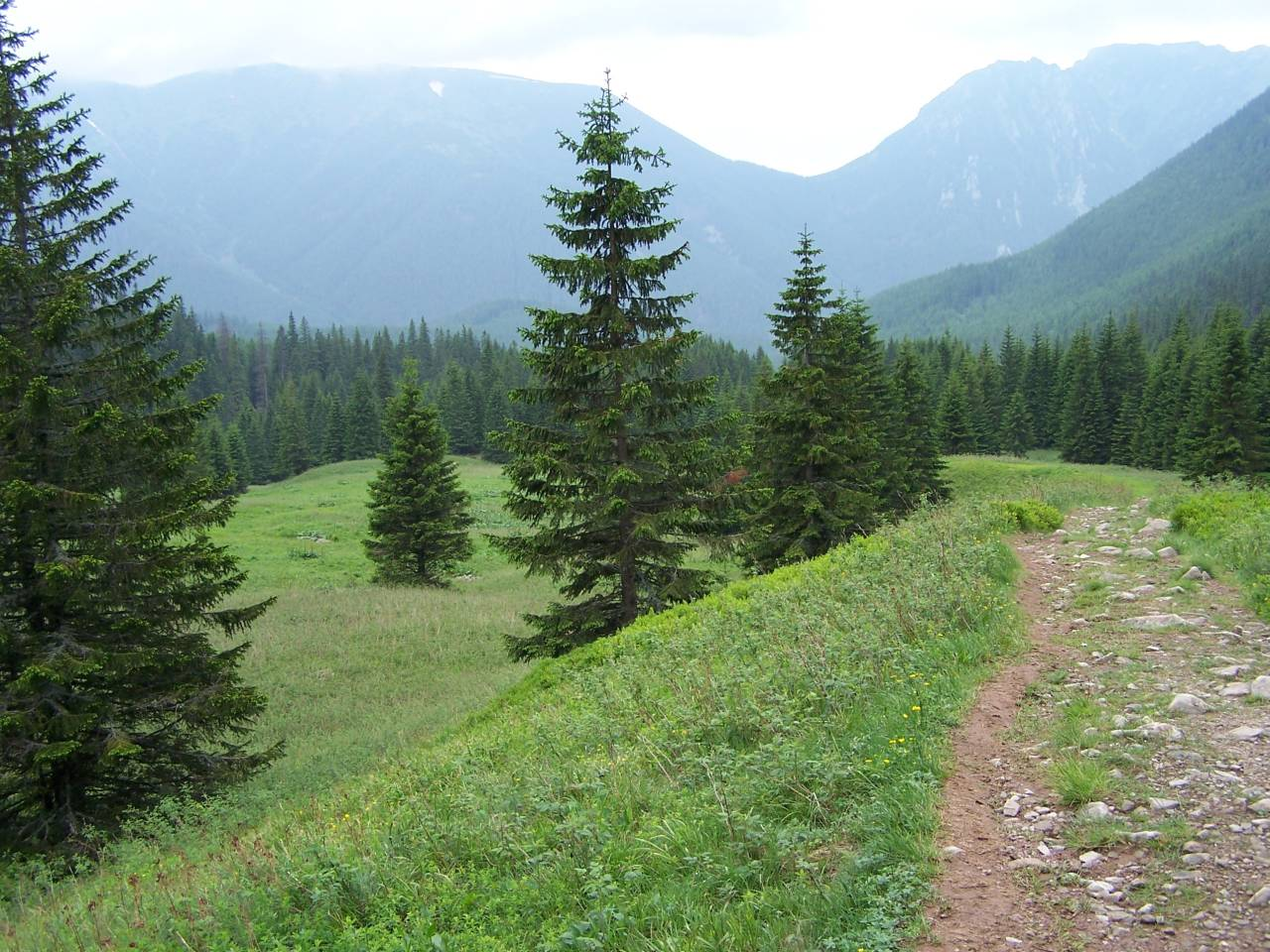 Wyżnia Polana Tomanowa (Dolina Tomanowa, West Tatra Mountains)